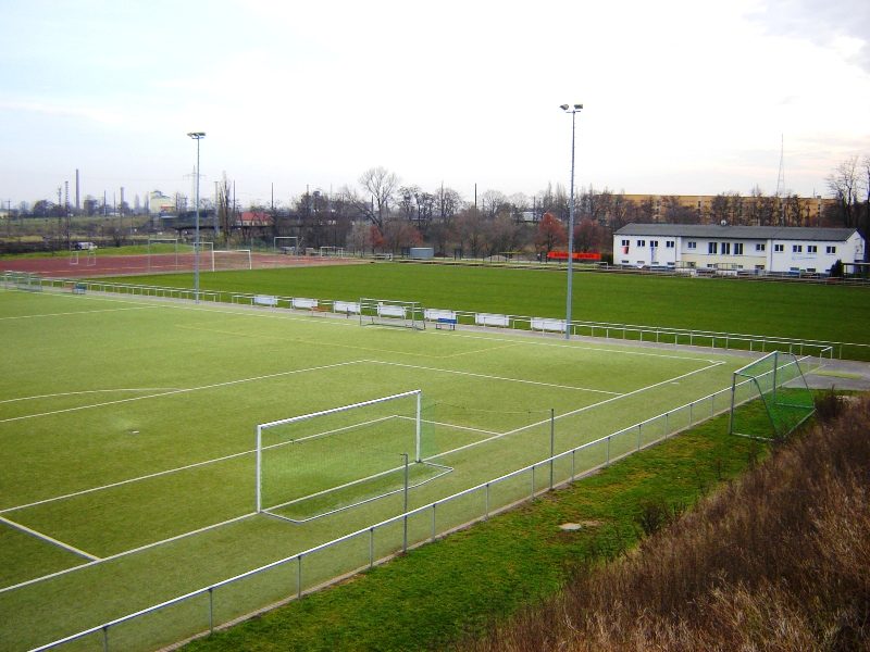 Sportplatz Schöppensteg, Magdeburg